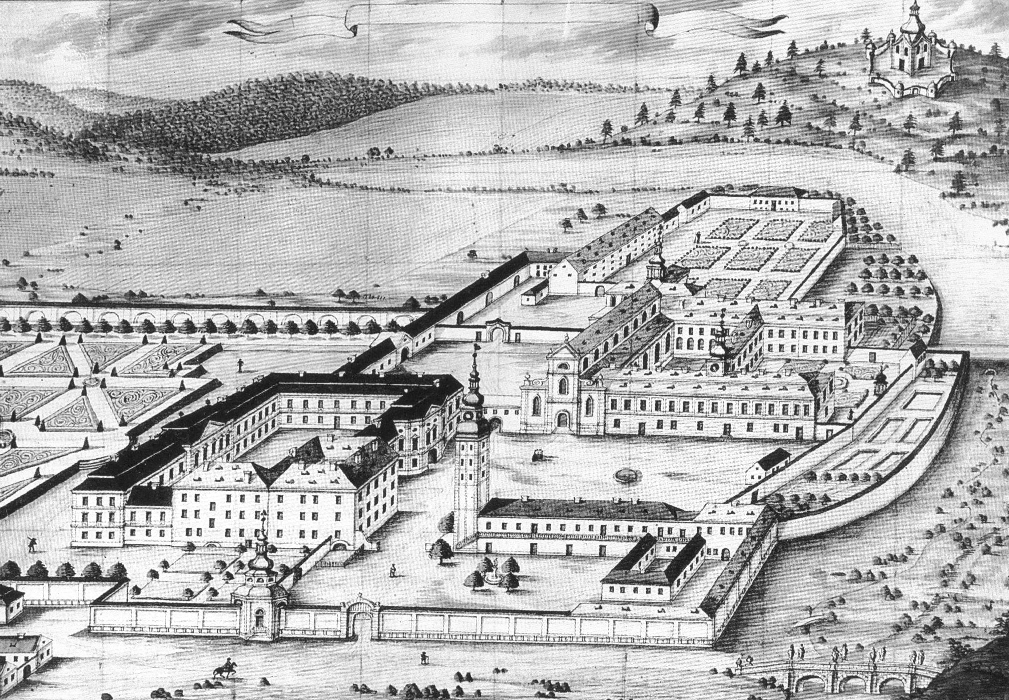 Prospekt klášterního areálu ve Žďáru nad Sázavou